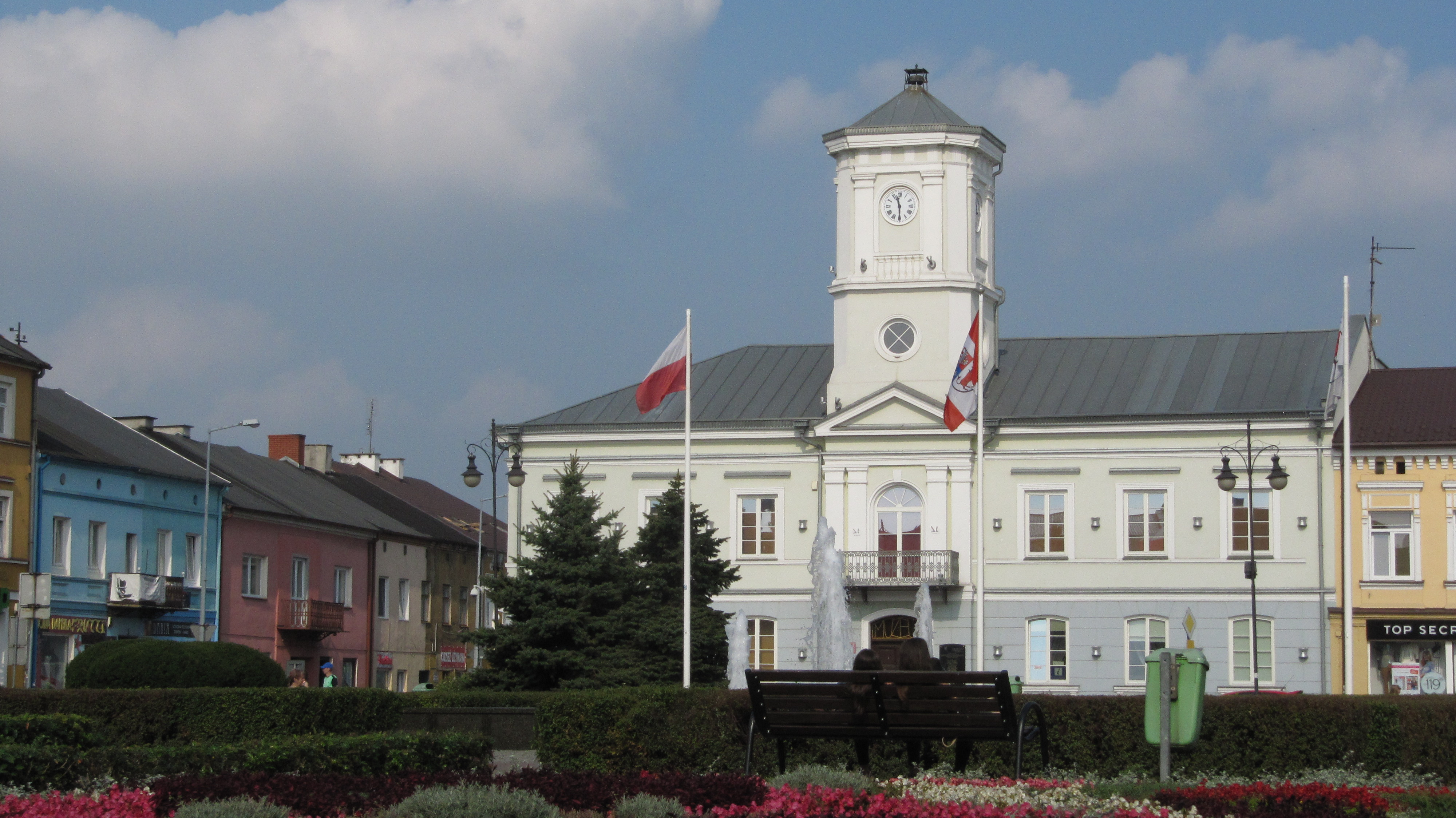 Altes Rathaus in Turek, heute städtisches Józef-Mehoffer-Museum, 2014